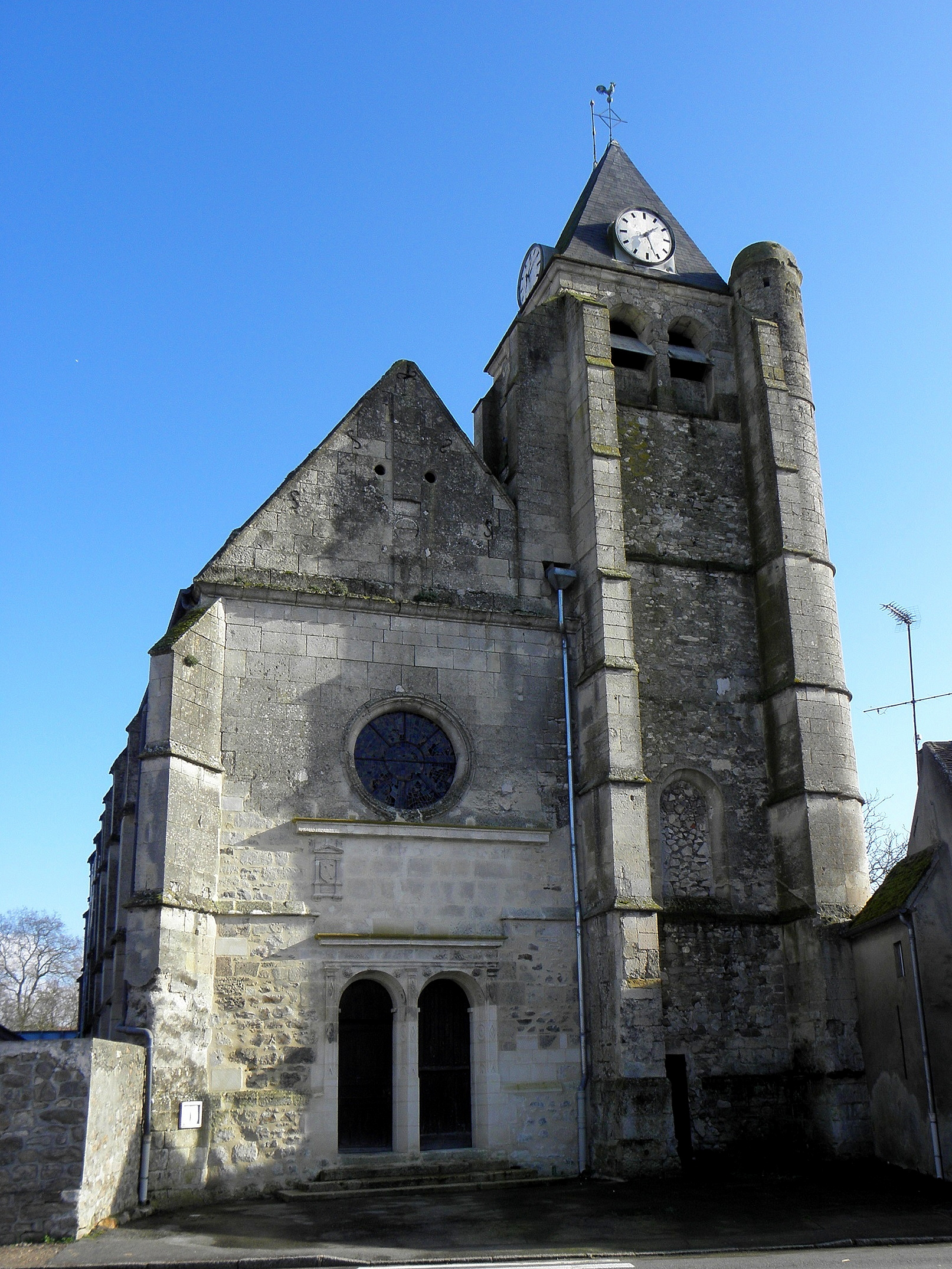 Église Saint-Aubin de Lévignen (60). Façade occidentale.